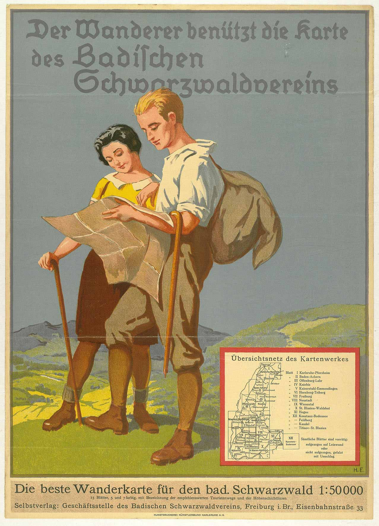 "Der Wanderer benützt die Karte des Badischen Schwarzwaldvereins". Farblithogr. v. Monogr. H.E. bei Kunstdruckerei Künstlerbund Karlsruhe, um 1920. 58,5 x 42,5 cm